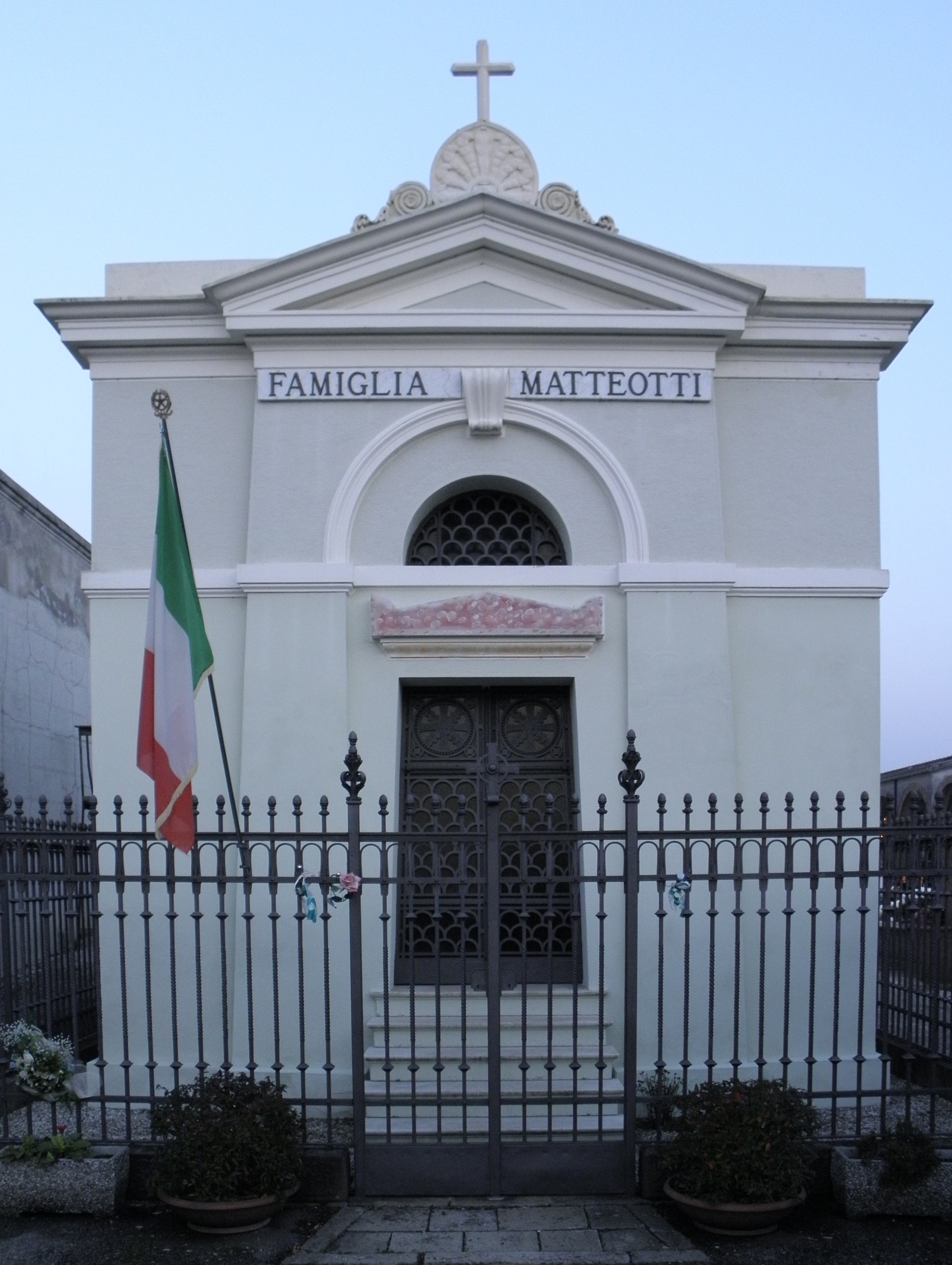 Cappella funeraria della famiglia Matteotti nel cimitero di Fratta Polesine.